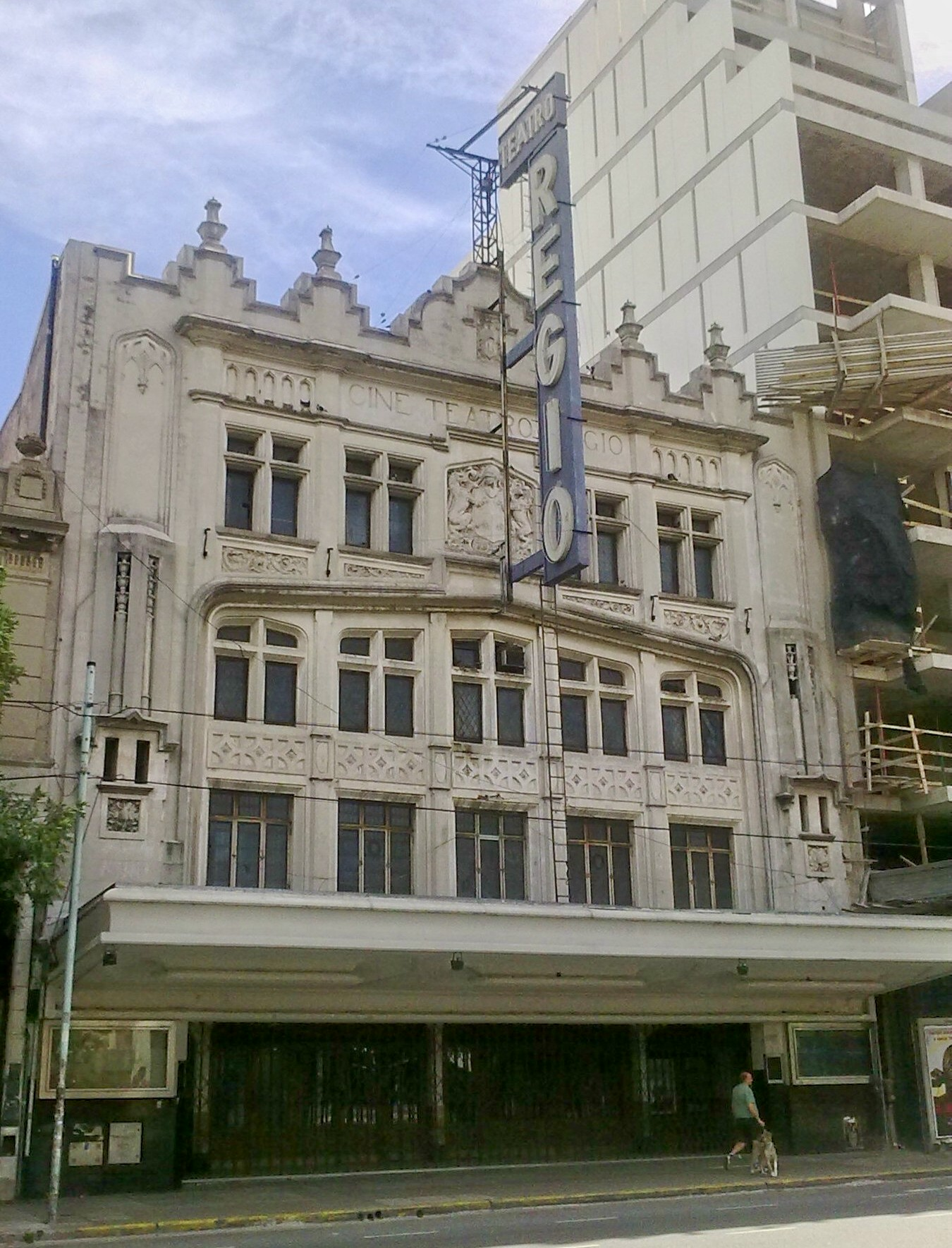 Avenida Córdoba 6065, Teatro Regio. Buenos Aires, Argentina.